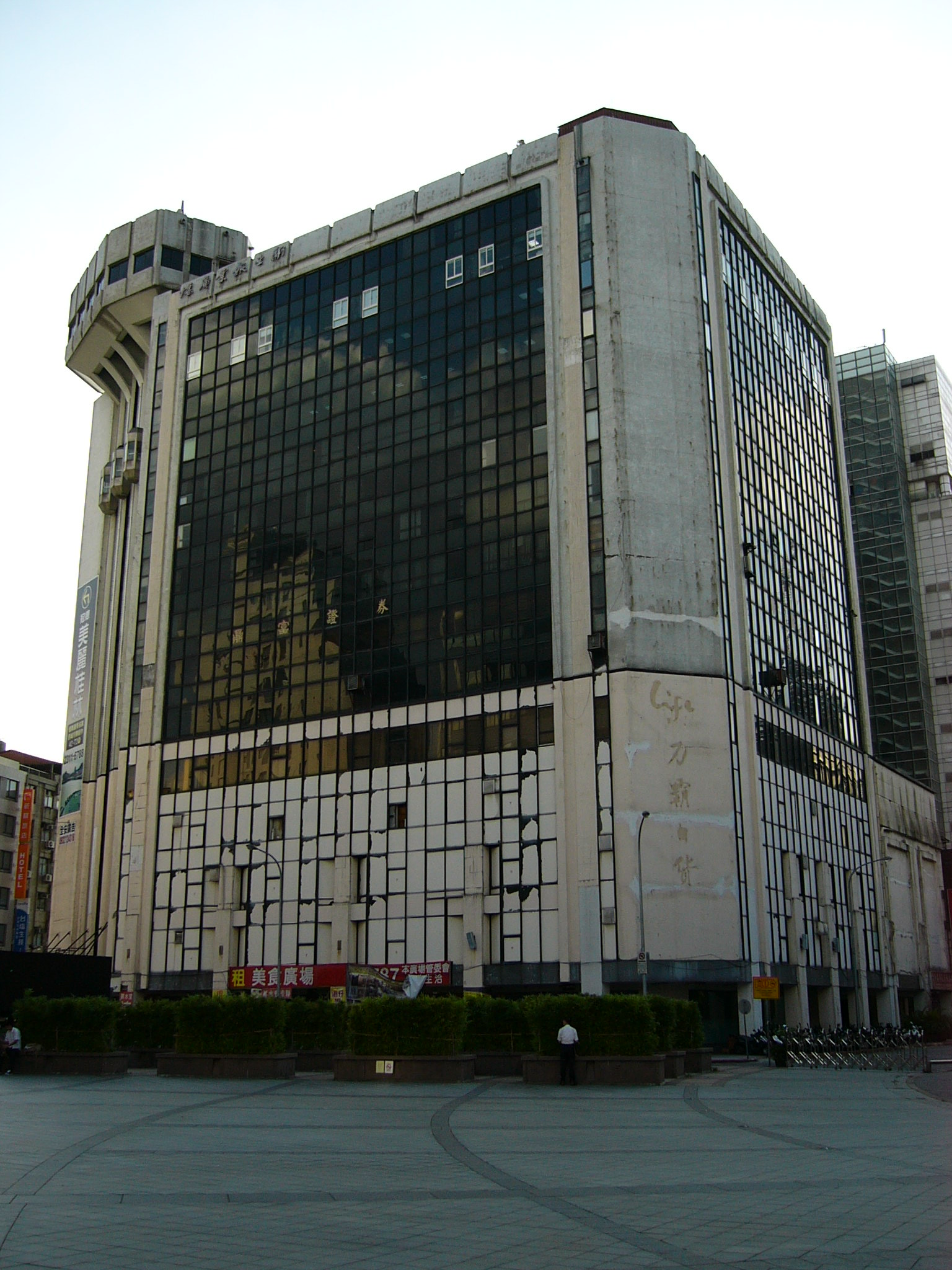 從臺北市中山堂廣場仰望新生報業廣場，外牆有力霸百貨鑄字招牌水漬。